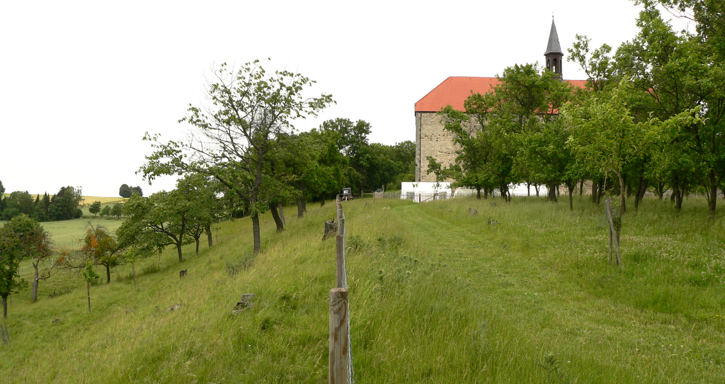 Kloster Wittenburg von Süden mit Streuobstwiese im früheren Klostergarten, terrassiertes, rechtwinkliges Gelände, nach links steil abfallend